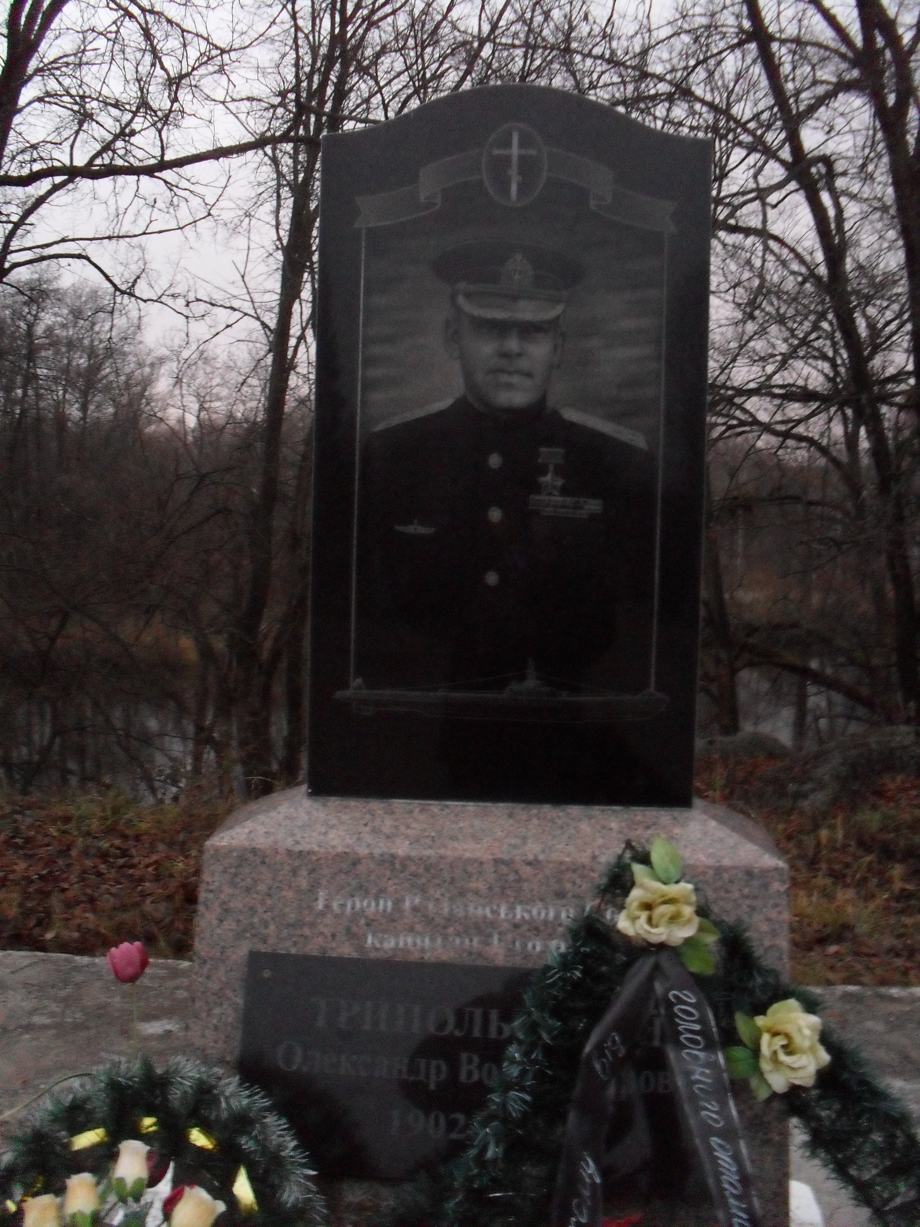 Пам'ятник Герою Радянського Союзу Трипольському Олександру Володимировичу (1902-1949) у с. Межирічка